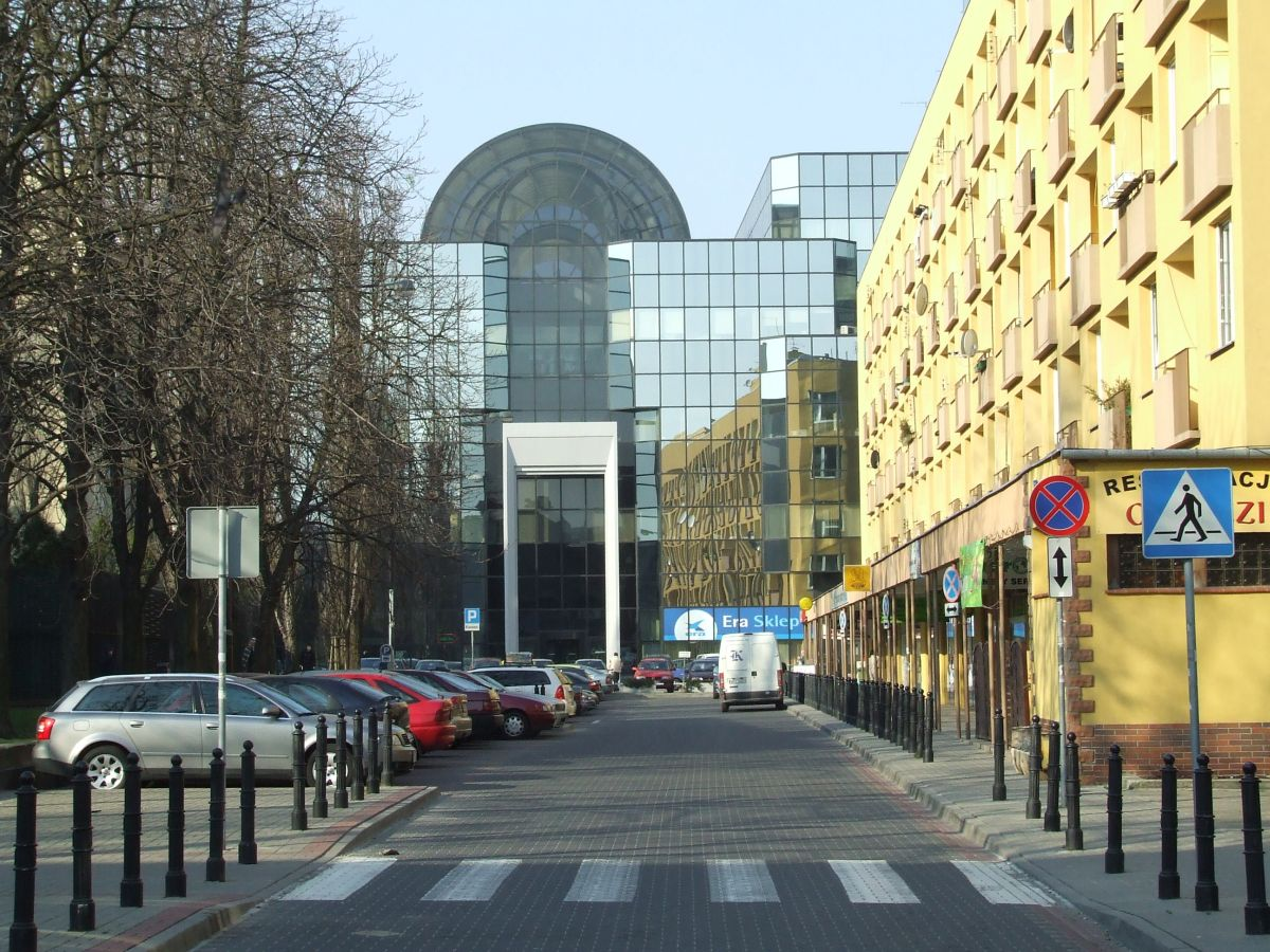 Błękitny Wieżowiec, widok od zaplecza pl. Bankowego, Warszawa